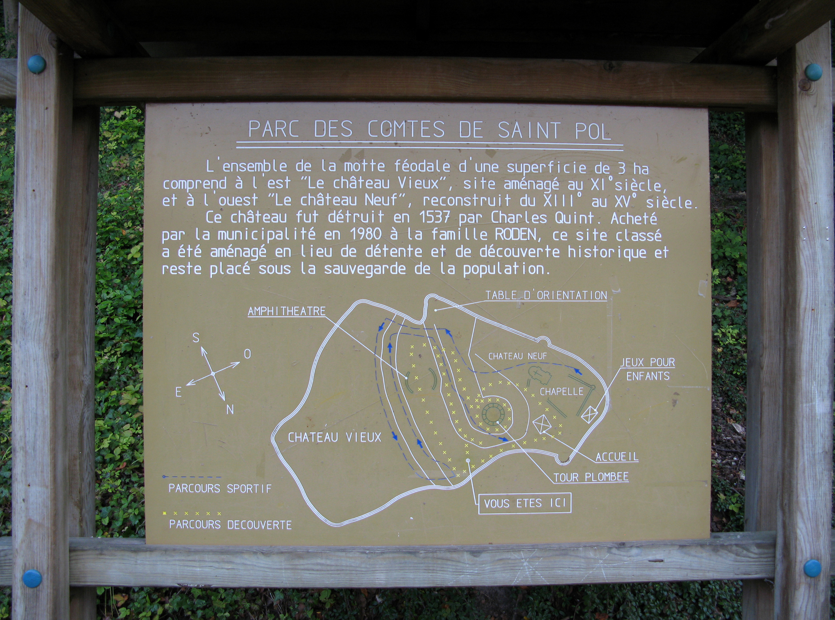 Saint-Pol-sur-Ternoise (Pas-de-Calais, France) - Le panneau descriptif dressé sur le site des vestiges du château. Il est dommage, à mon avis, que ce plan des lieux ne respecte pas la position traditionnelle des points cardinaux et/ou ne "localise" pas le centre-ville (avec l'église et l'hôtel-de-ville). .